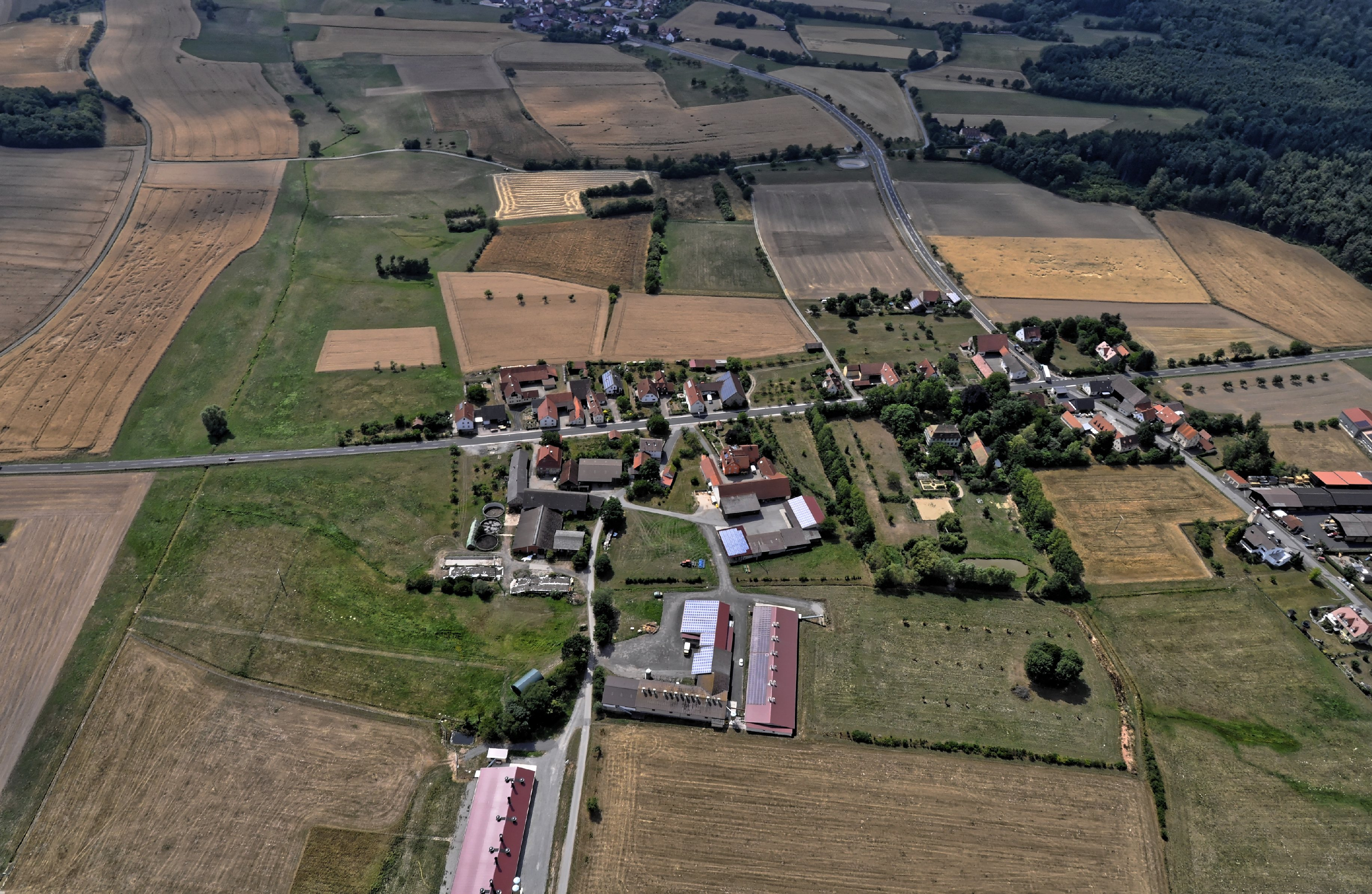 Bilder vom Flug Nordholz-Hammelburg 2015: Blick von Osten auf Neuwirtshaus. Die B 27 verläuft quer durch das Bild und den Ort.